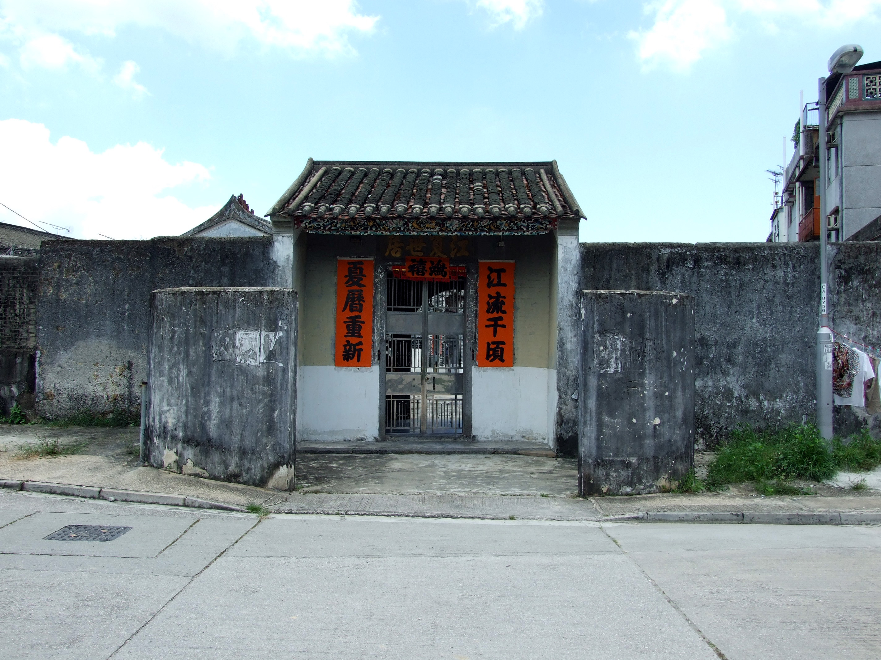 中文（香港）: 松柏塱客家圍